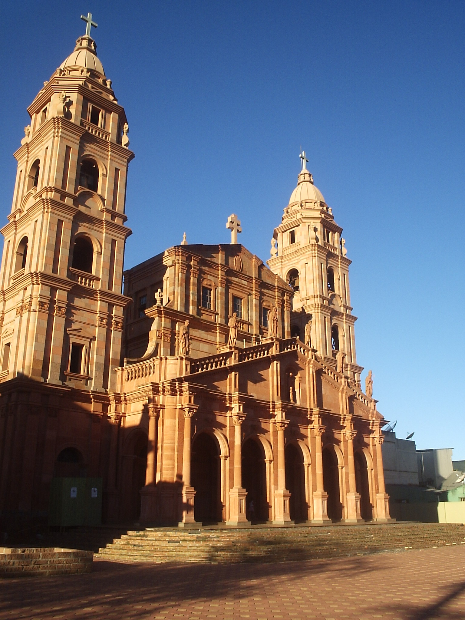 Catedral Angelopolitana, sé da Diocese de Santo Ângelo, Rio Grande do Sul (Brazil).